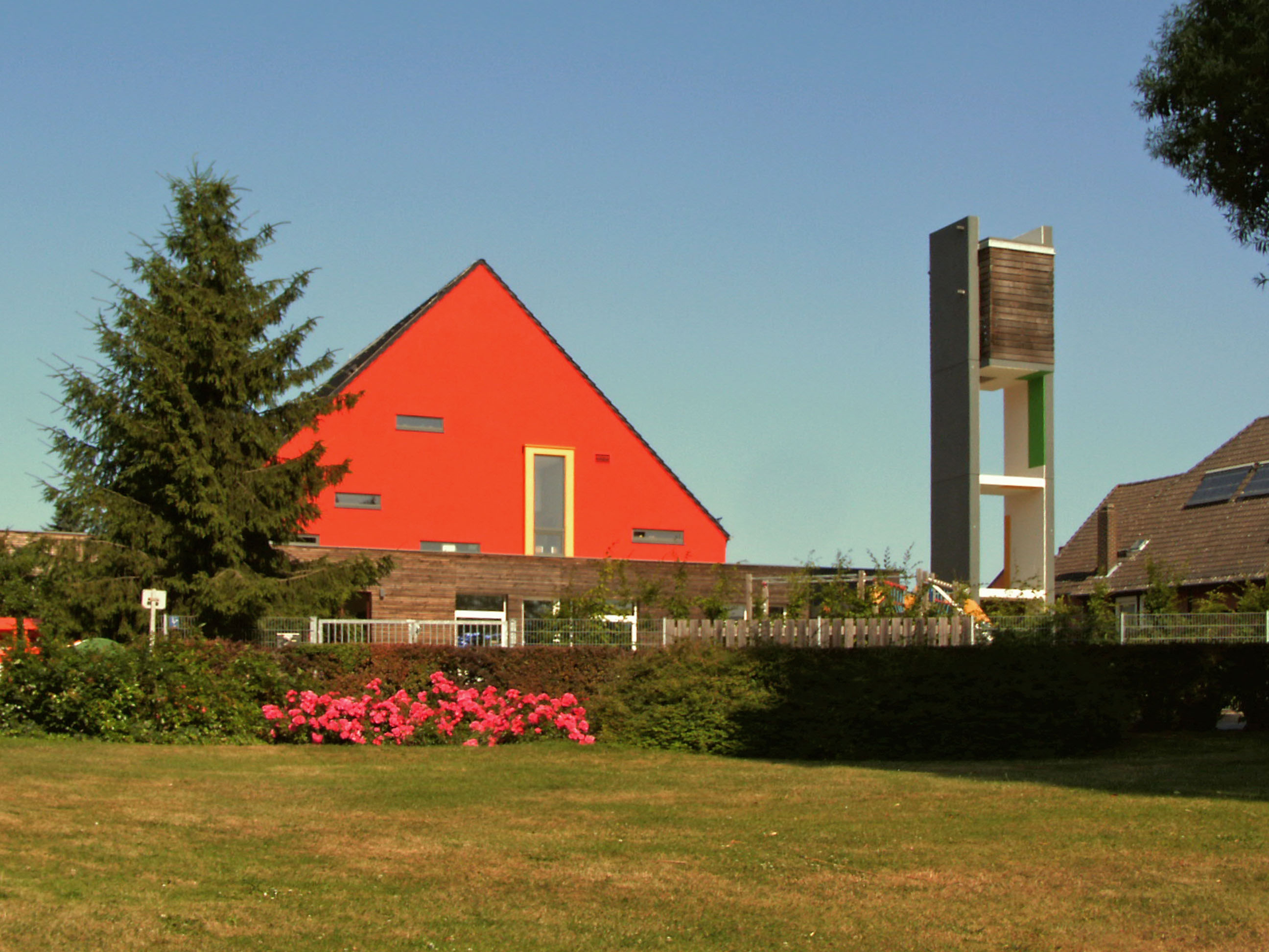 Städtischer Kindergarten in Stederdorf, Stadtteil von Peine (in ehemaliger katholischer Kirche).